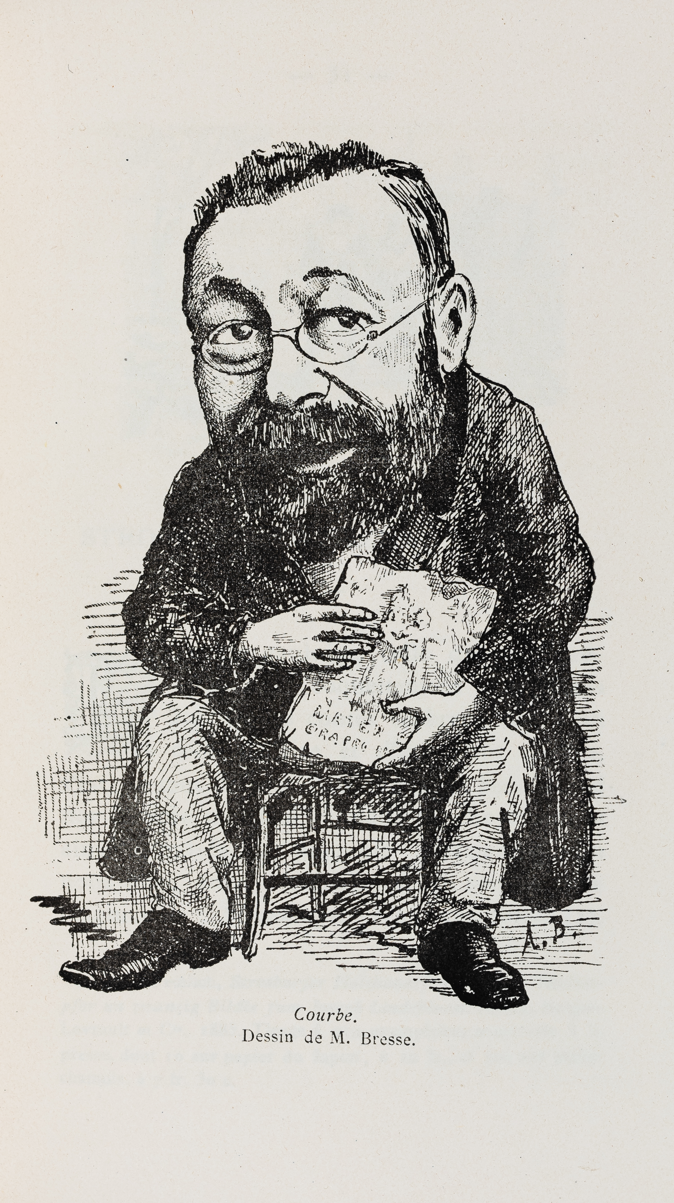 Un petit homme barbu avec des lunettes est assis sur une chaise. Il tient un livre dont on ne distingue pas le titre. Il porte une redingote noire, un pantalon clair et des chaussures. Le personnage est caricaturé. Il s'agit de Charles Courbe (1839-1885), comptable et historien de Nancy.